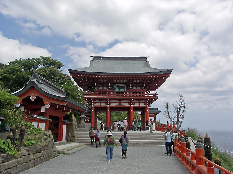 Udo jingu shrine , 鵜戸神宮